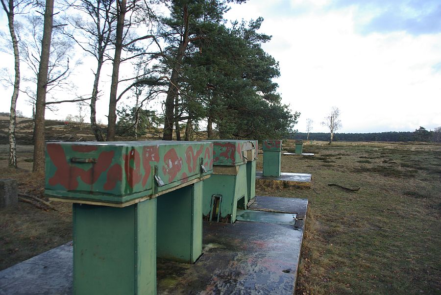 Een eind van de ijkbasis Nederlands rijksdriehoeknet op de Zilvensche heide bij Loenen. Eigen foto Caseman, januari 2007.